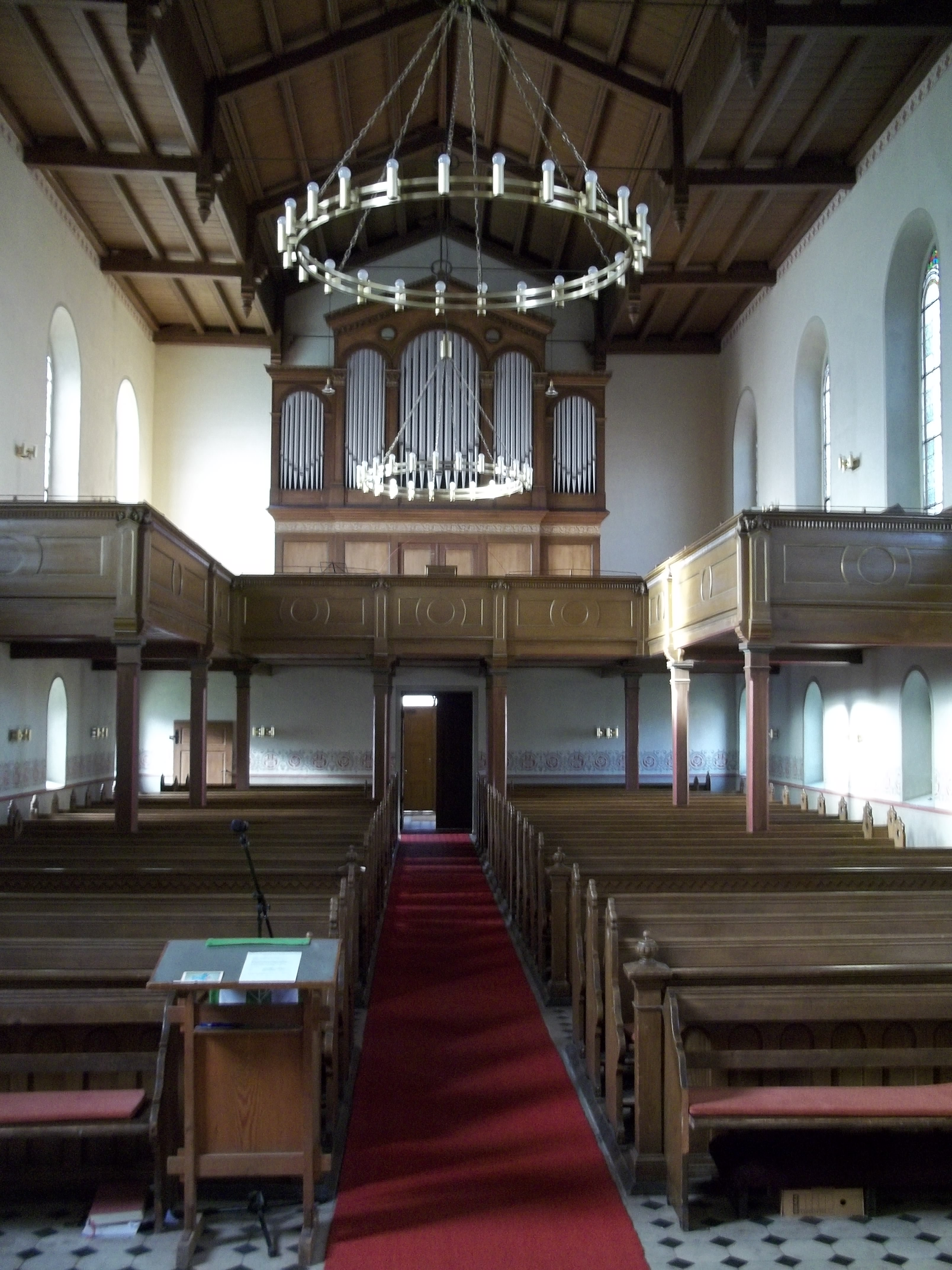 Kirche Leopoldshall: Blick vom Altar ins Kirchenschiff und zu Empore und Orgel